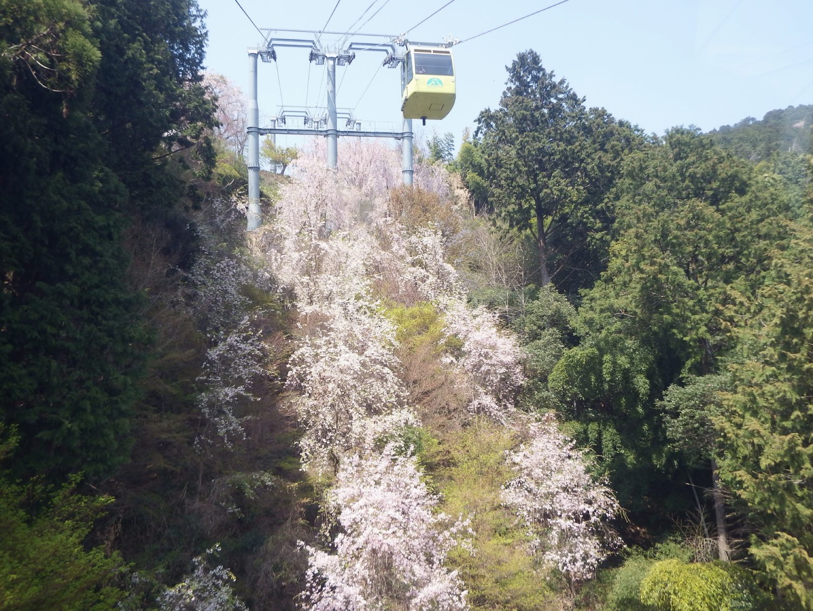 箸蔵山ロープウエイの春